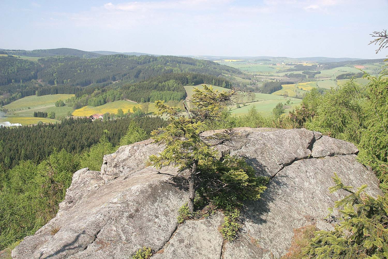 Přírodní památka Prosíčka, district Žďár nad Sázavou